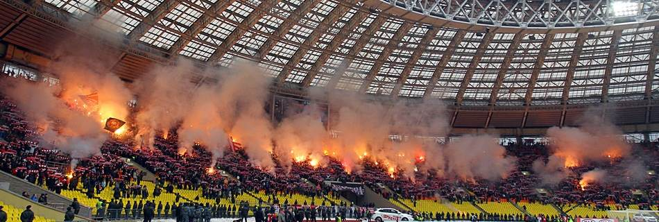 Фаер-шоу на трибуне Б